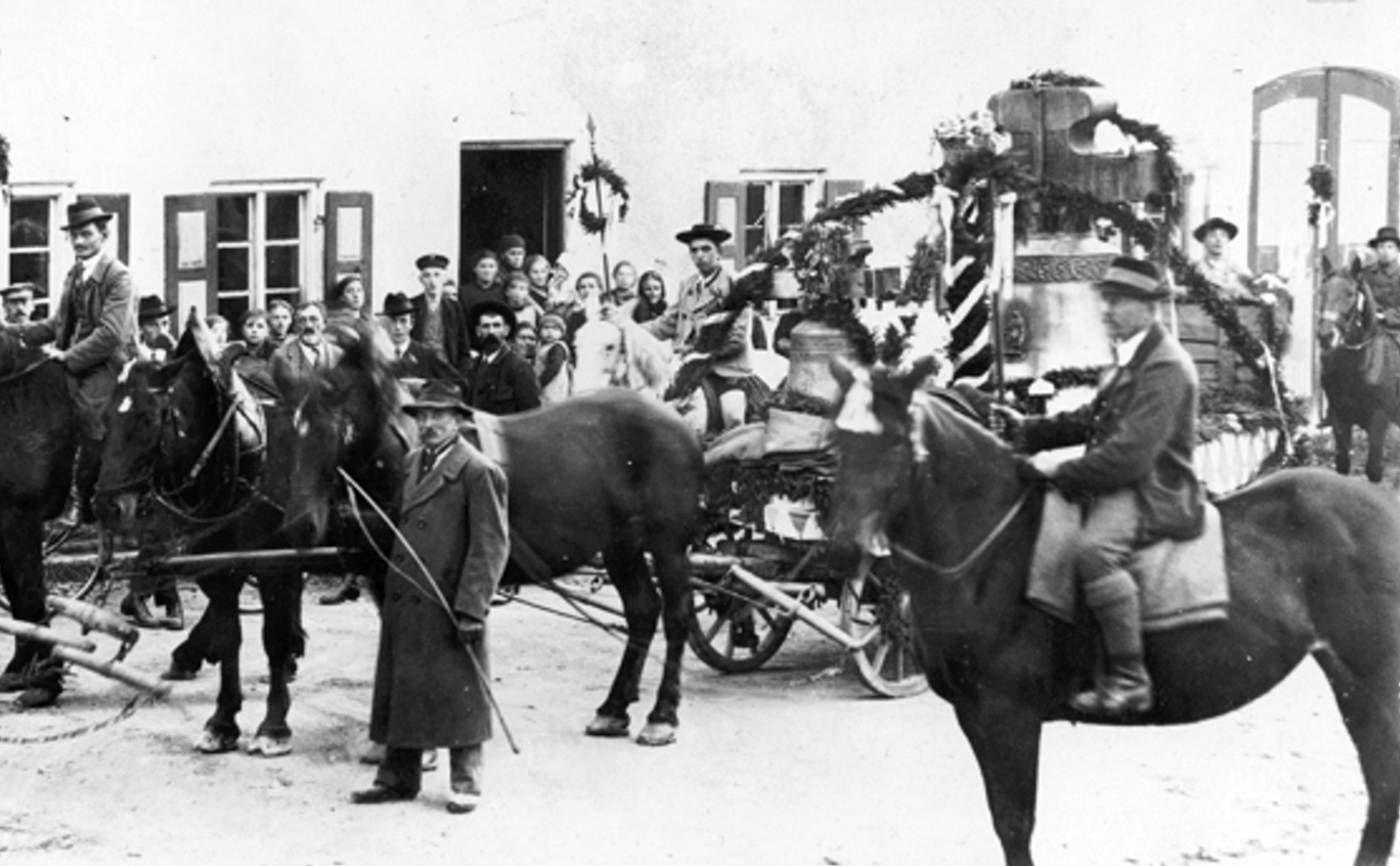 Starnberg, OT Perchting, Kirche Mariä Heimsuchung. Neue Kirchenglocken im Jahr 1920.